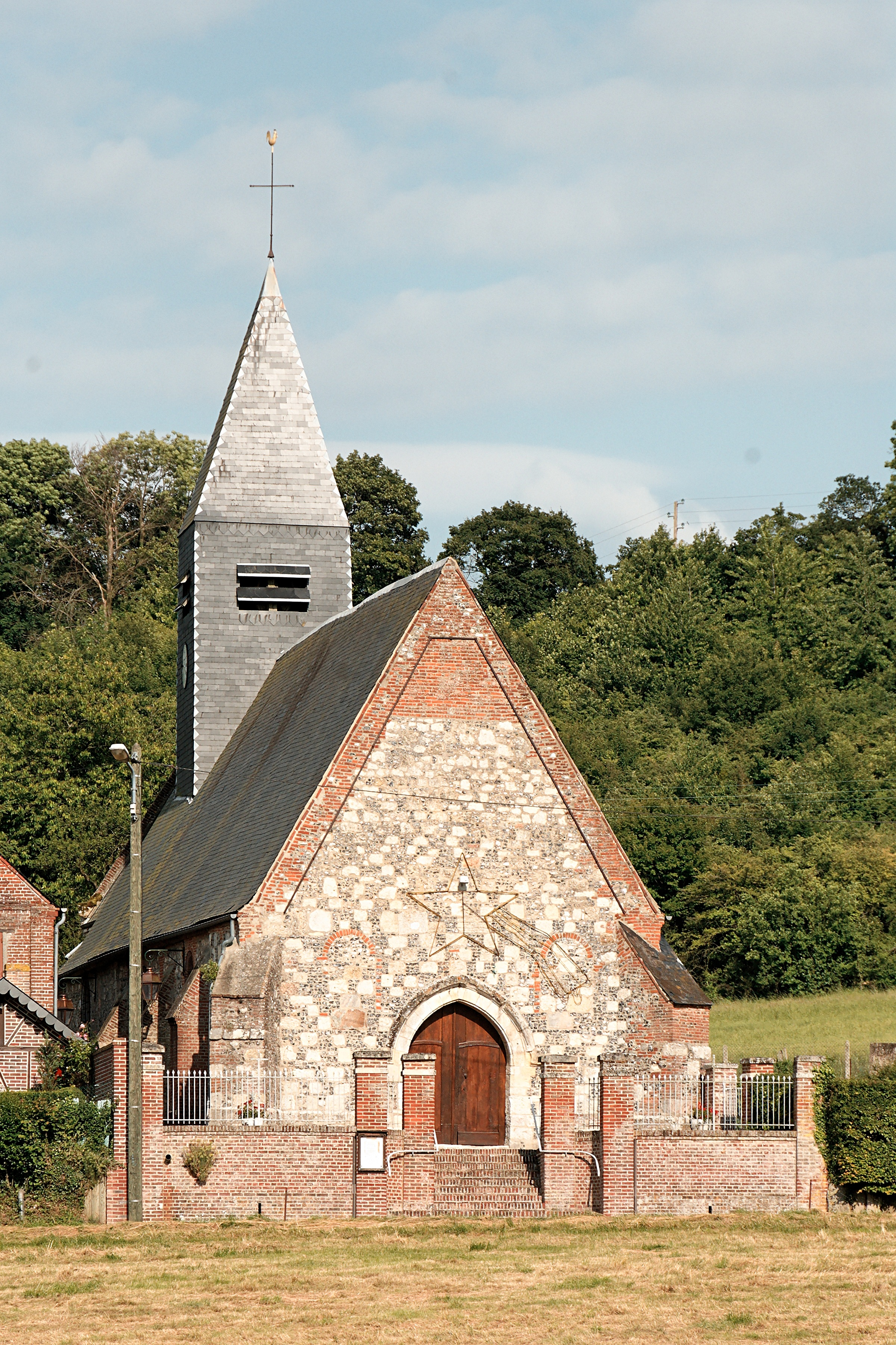 Église Saint-Martin d'Oudeuil (Oise).